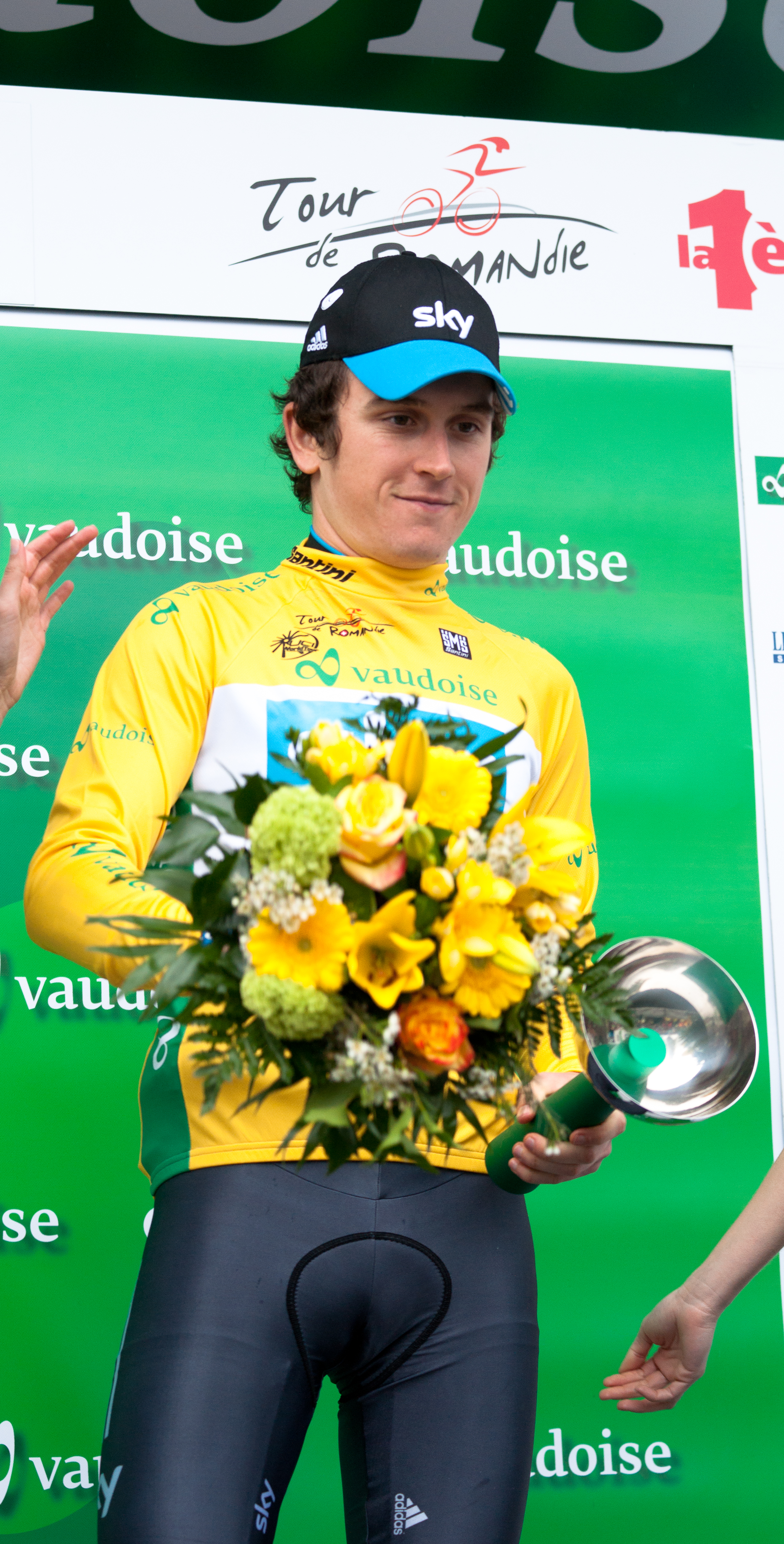 Geraint Thomas sur le podium du prologue du Tour de Romandie 2012